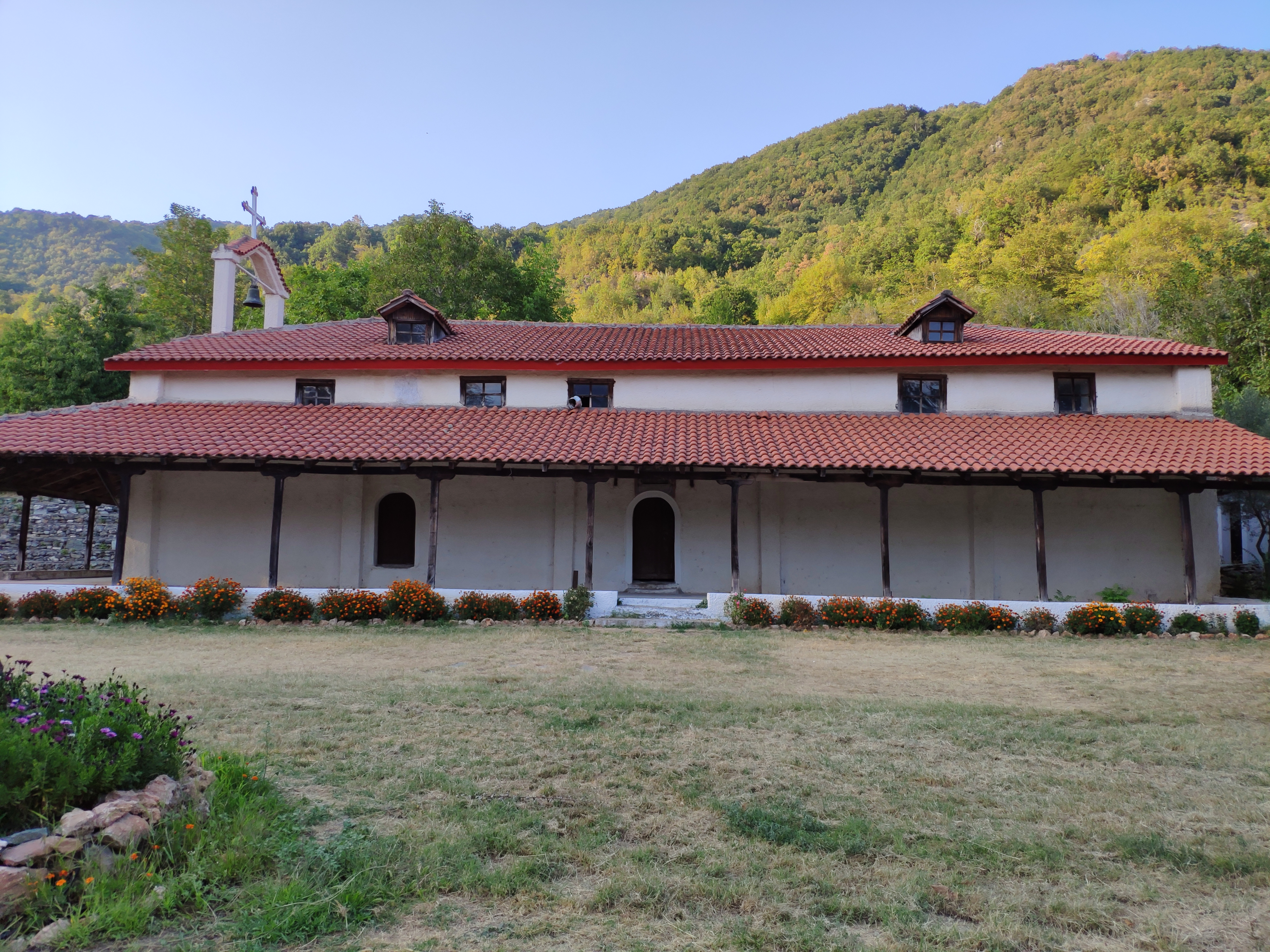 Ναός Αγίου Ιωάννη Προδρόμου στο Άνω Λουτράκι«Ναός Αγίου Ιωάννη Προδρόμου στο Άνω Λουτράκι»